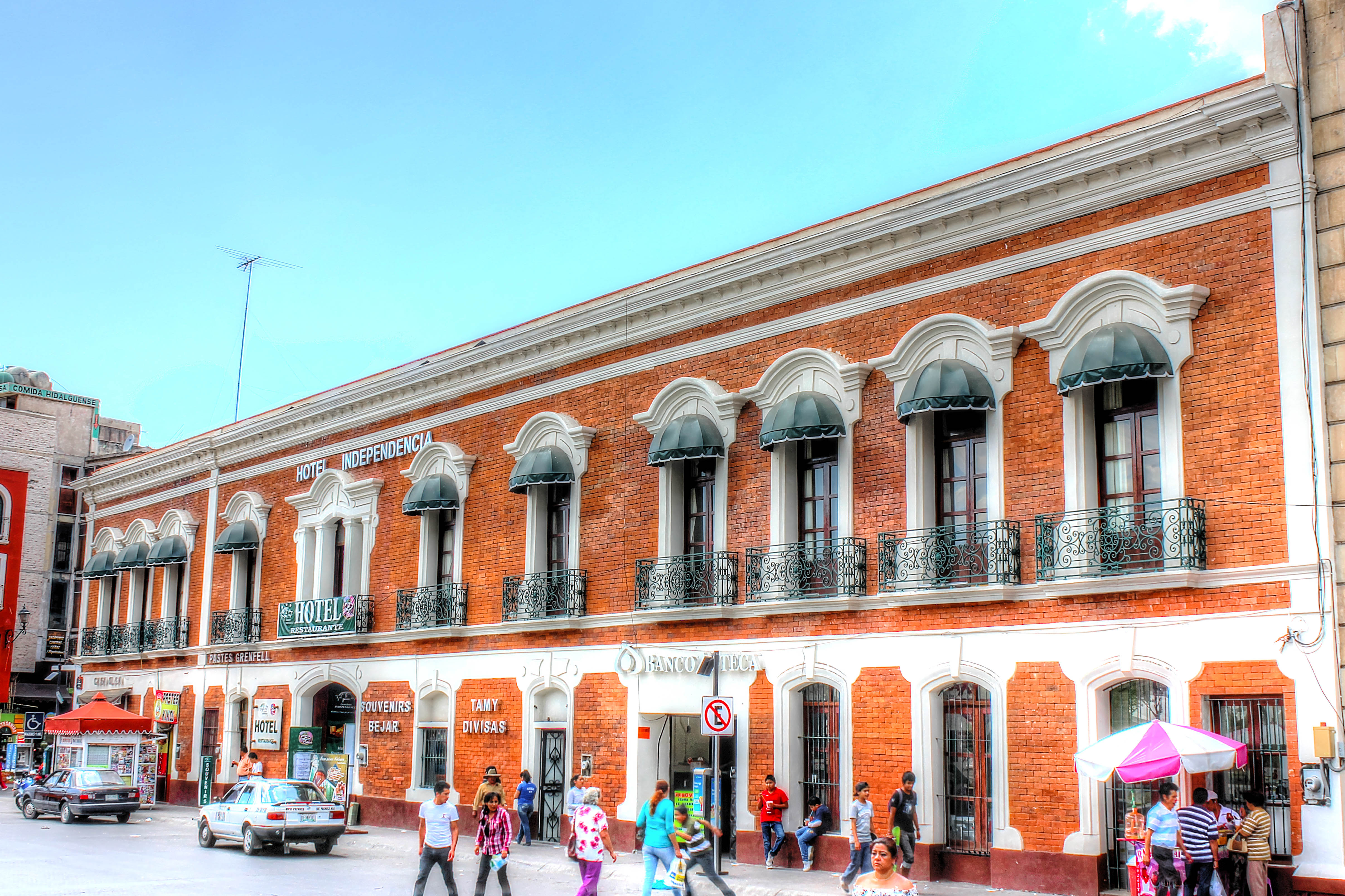 Pachuca de Soto